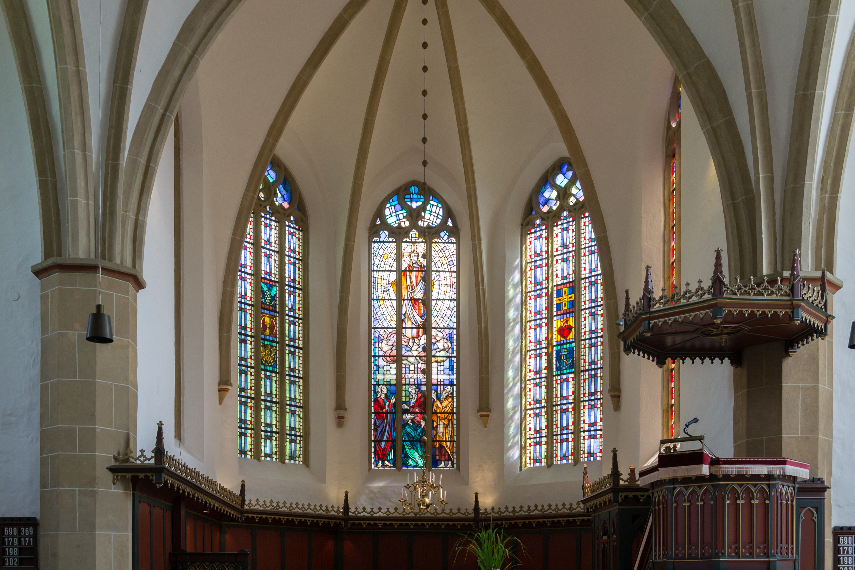 Rekonstruierte Chorfenster von Karl Löwe (1878–1942) in der evangelisch-reformierten Alexanderkirche in Oerlinghausen